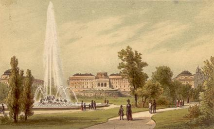 Hochstrahlbrunnen with Schwarzenberg Palais in the background, Vienna